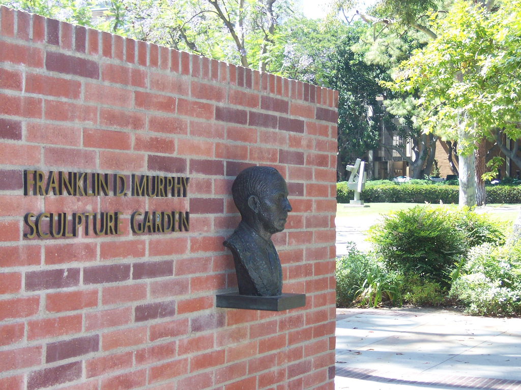 Franklin D. Murphy Sculpture Garden